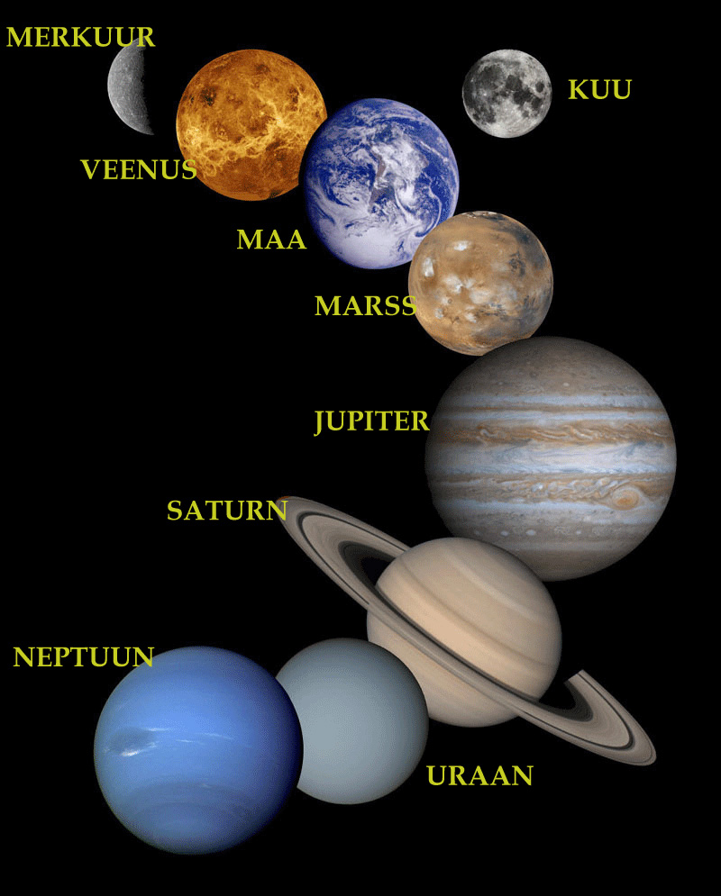 Päikesesüsteem